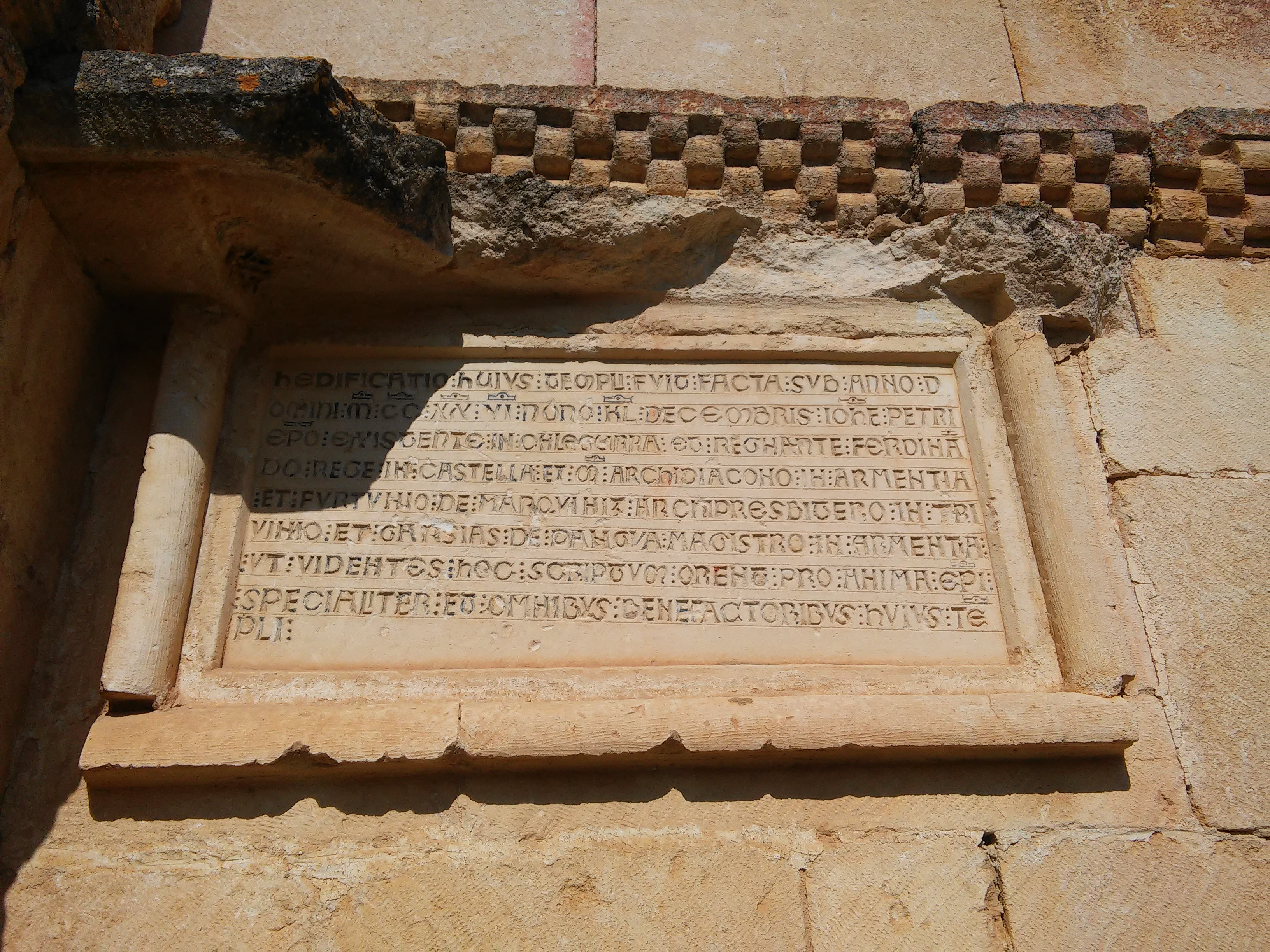 Markizko San Joan baselizako idazkia